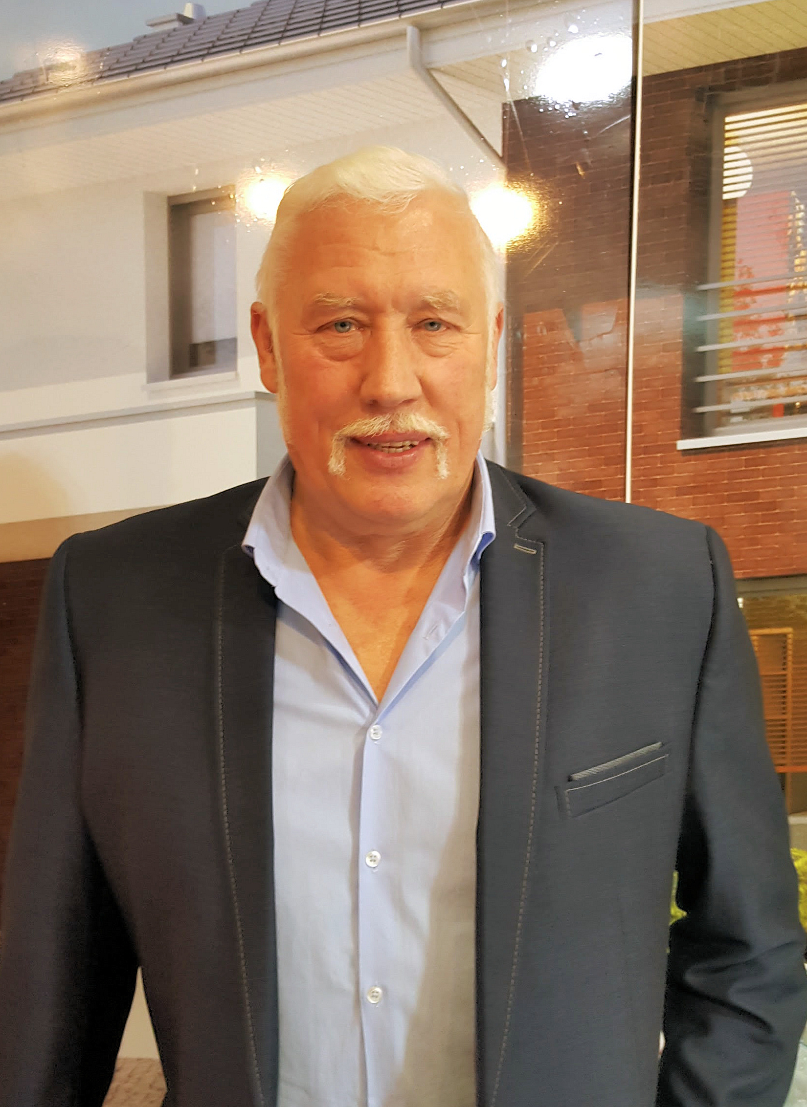 Władysław Kozakiewicz - polski lekkoatleta na MTP w Poznaniu